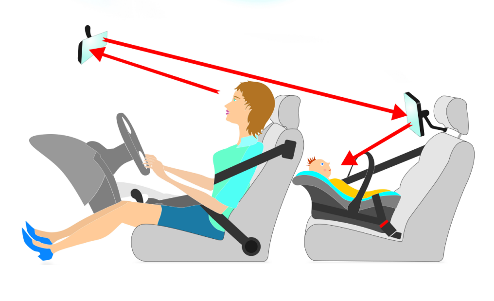 Skizze zur Funktionsweise des Babyschalenspiegels